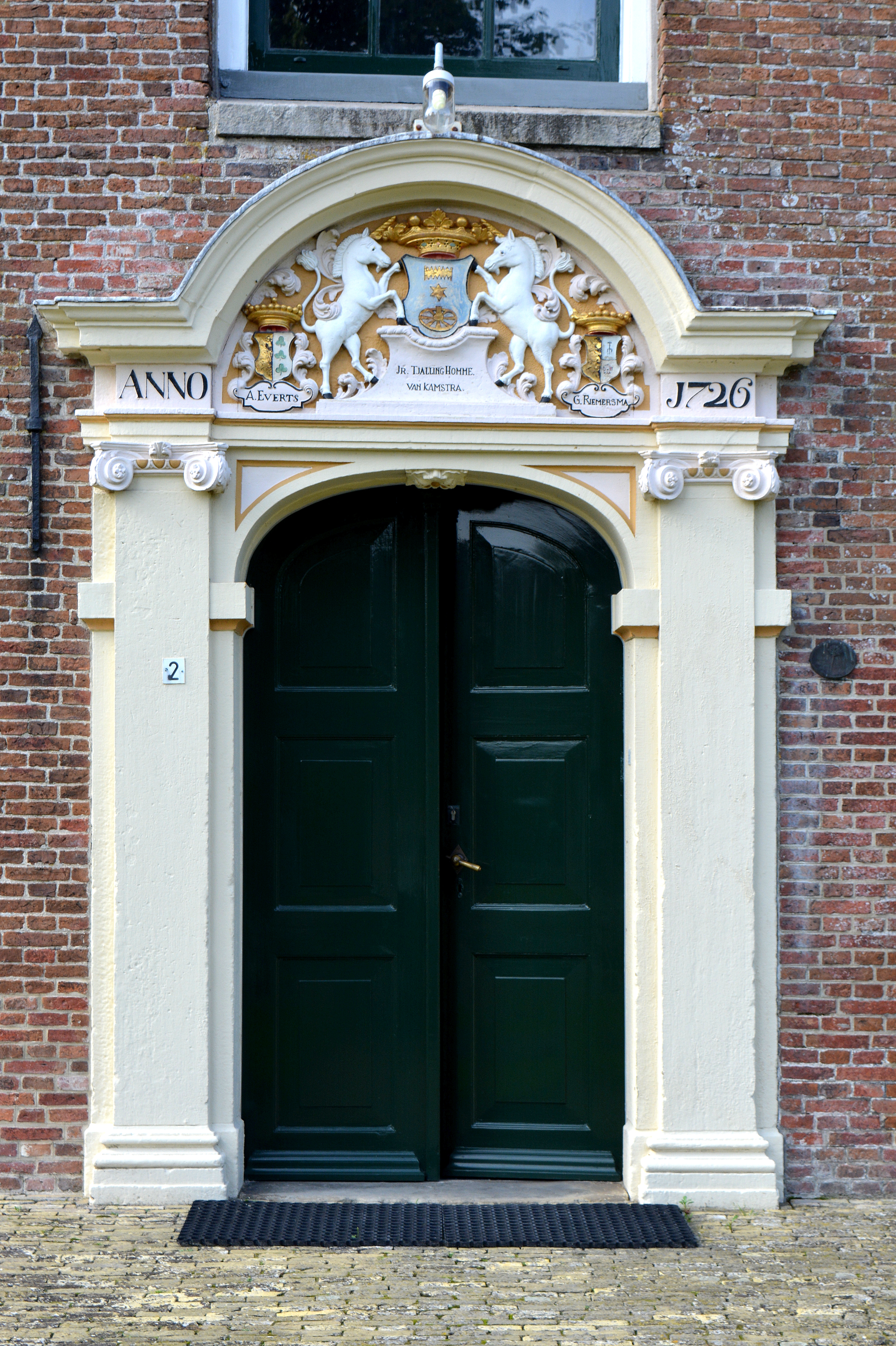 Reduzum, Vincentiustsjerke